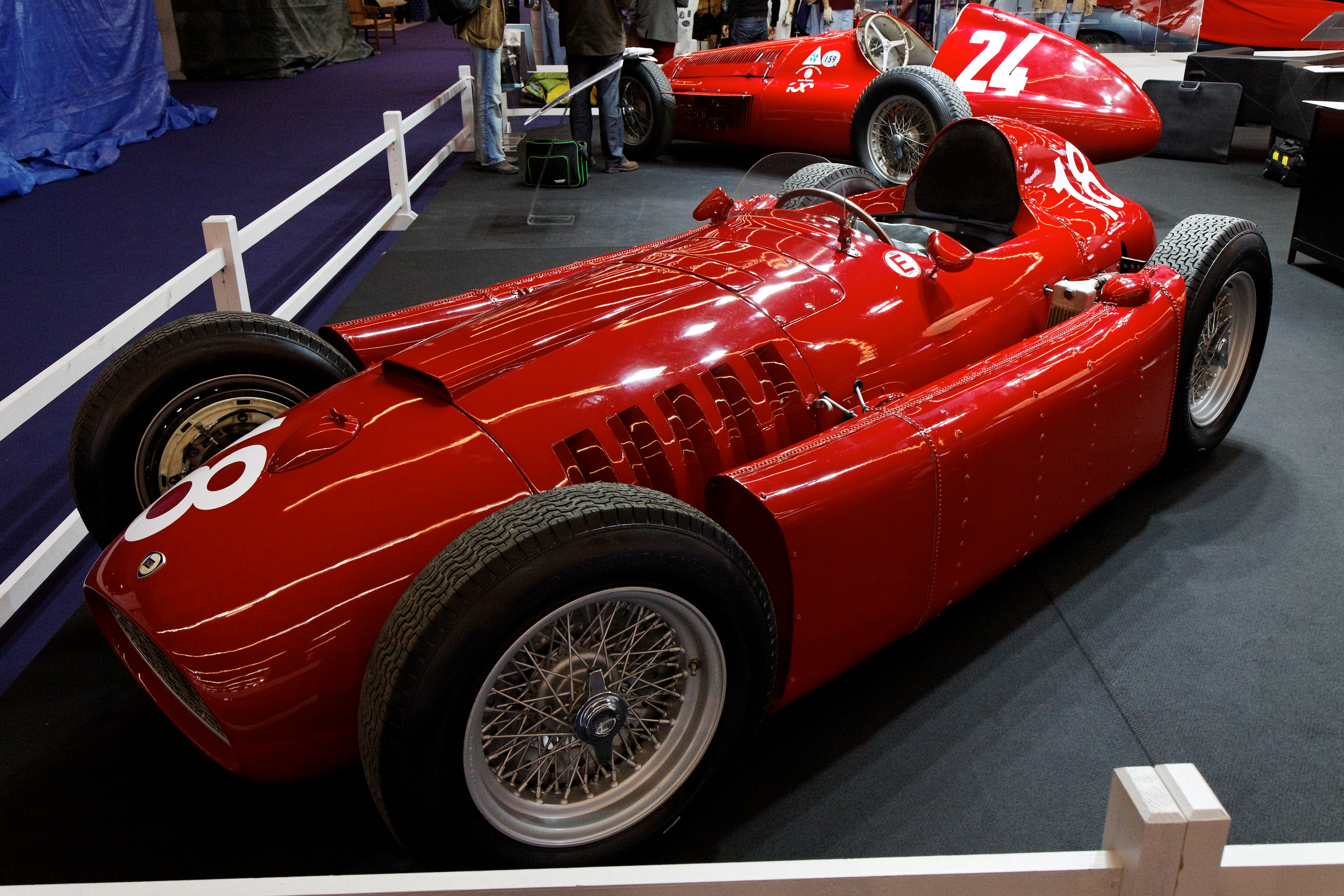 Photographie prise lors du salon rétromobile 2011 à Paris, porte de Versailles.